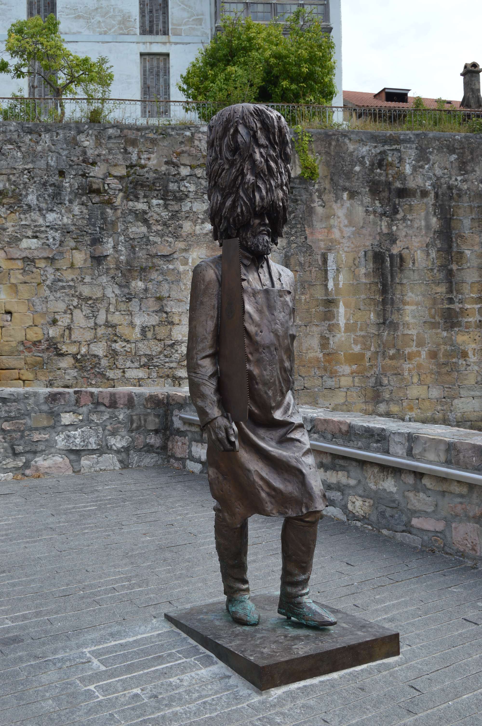 Hondarribiko auzo historikoa